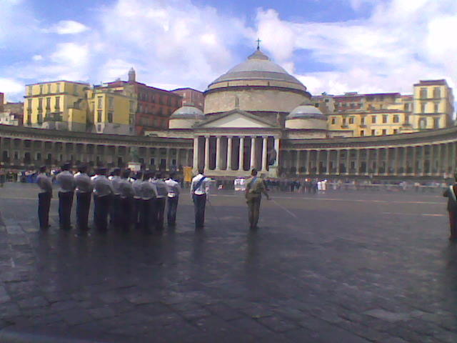 Foto di Piazza del Plebiscito (NA) il giorno 2-06-09 durante la manifestazione per la festa della repubblica